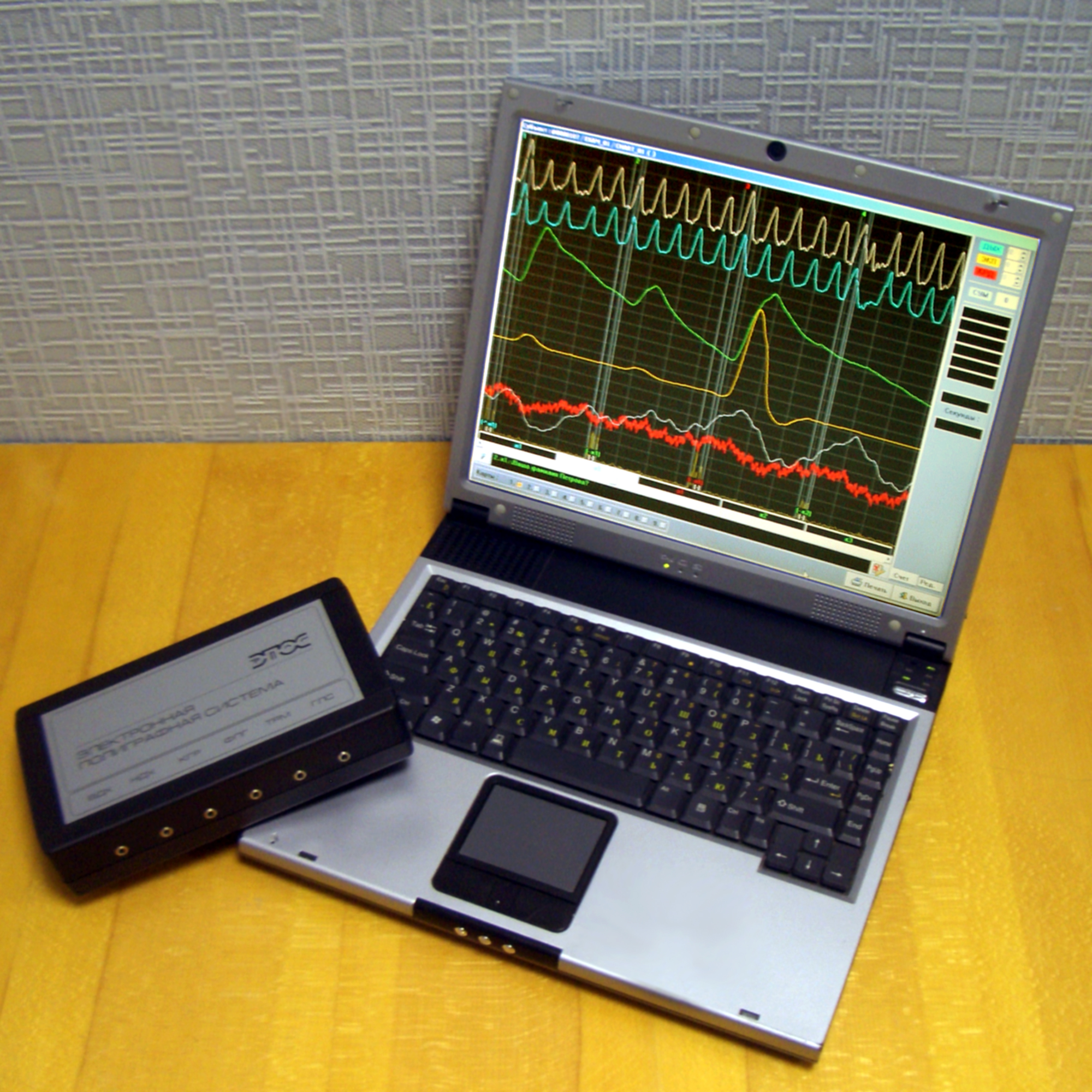 Современный компьютерный полиграф ЭПОС-7: сенсорный блок с ПК